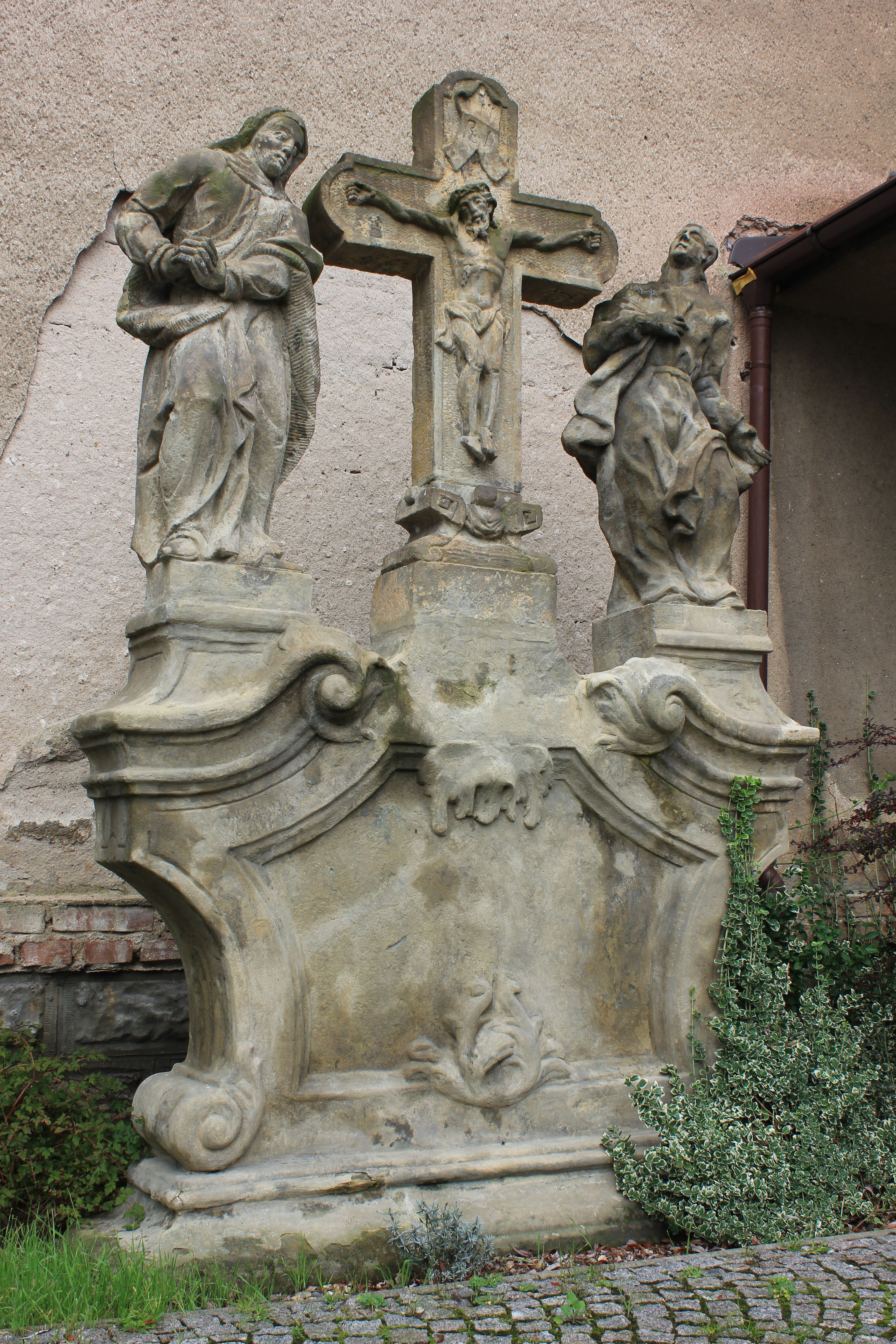 Sousoší Kalvárie, u kostela (východní průčelí), Velký Osek.